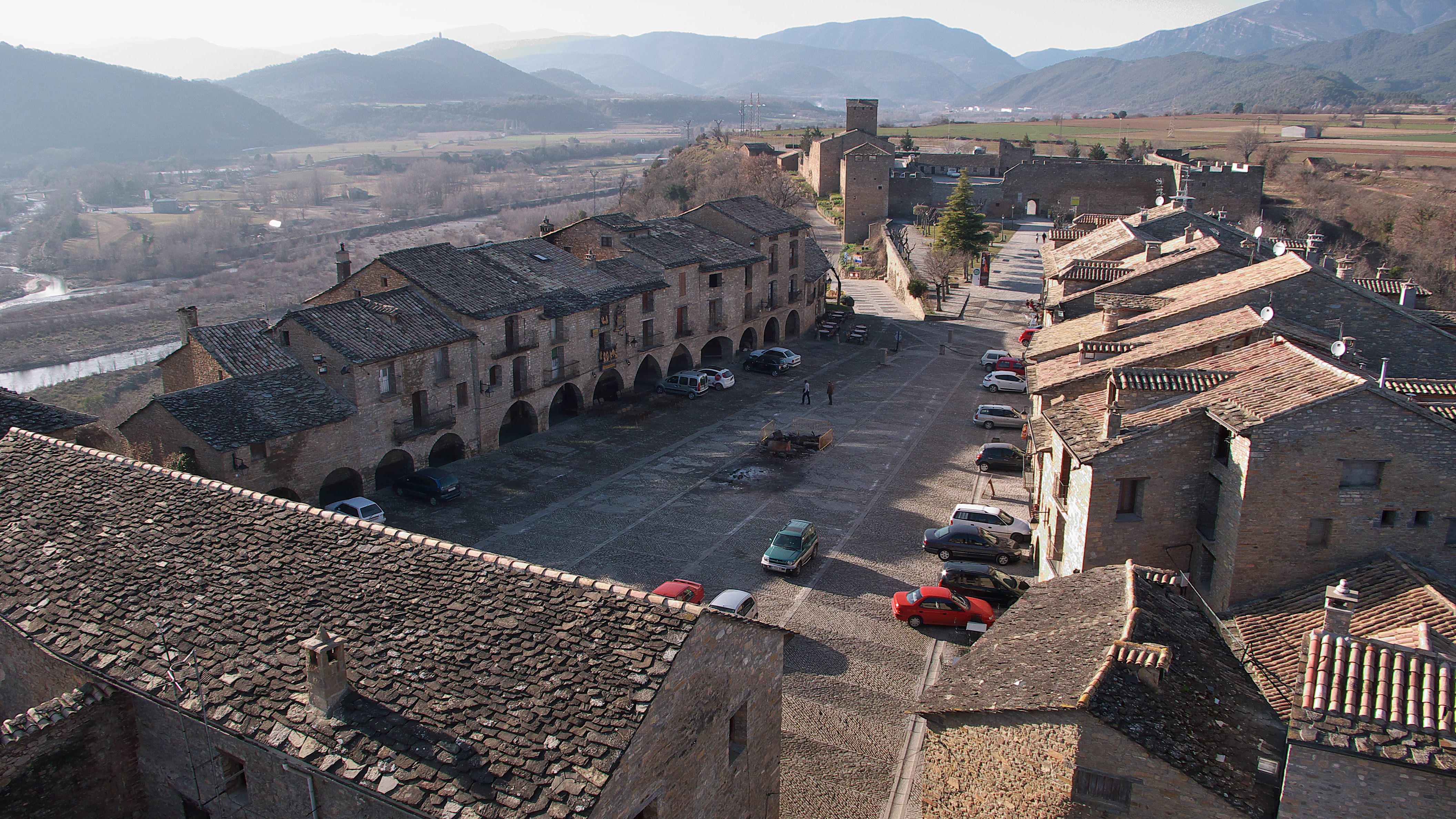 Una de las plazas mayores medievales más espectaculares de España